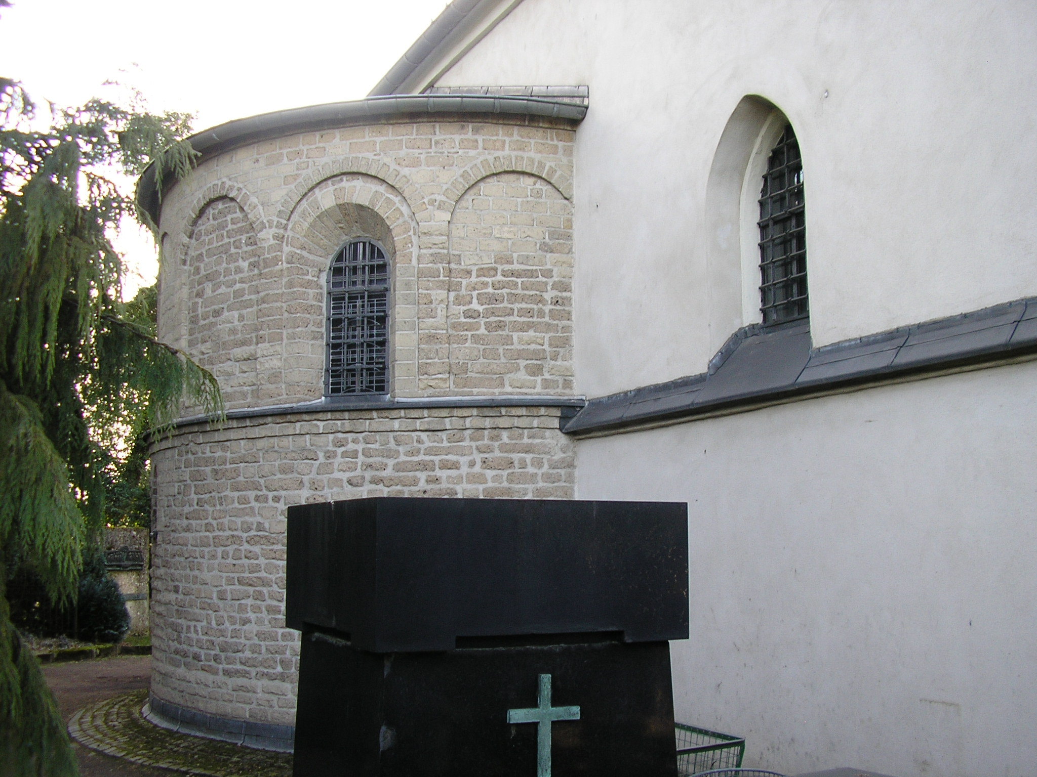 Alt St. Mauritius (Köln-Buchheim)